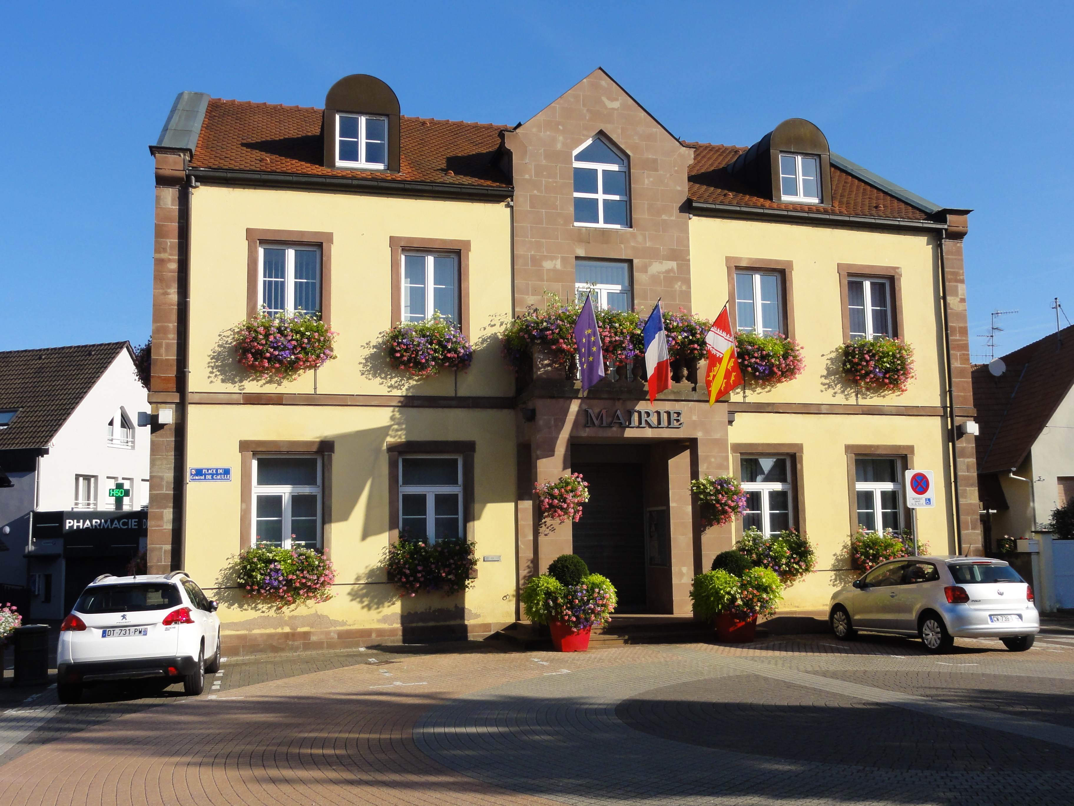 Alsace, Bas-Rhin, Souffelweyersheim, Mairie.}